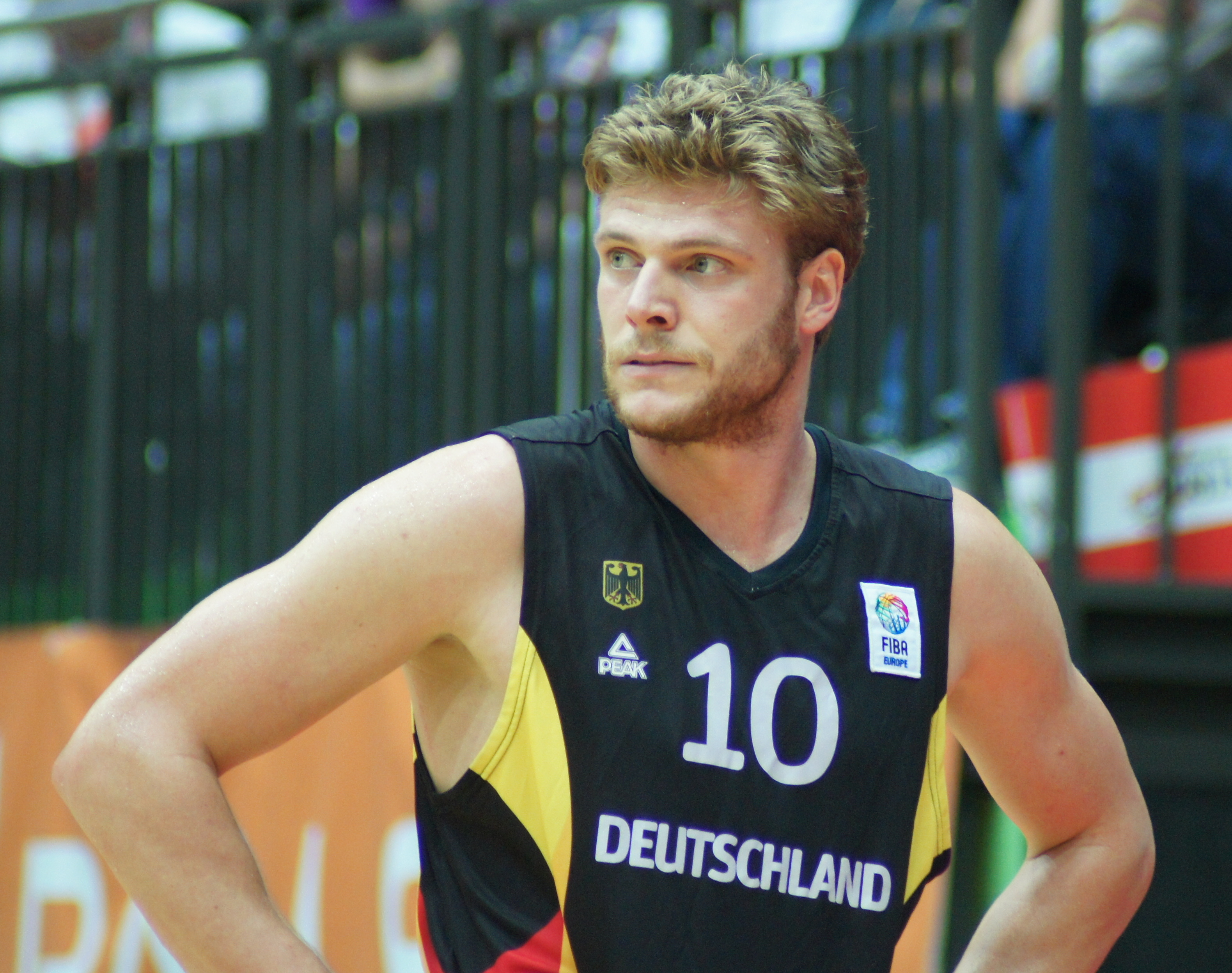 Qualifikationsspiel EuroBasket Österreich - Deutschland, 13. August 2014 im Multiversum Schwechat.